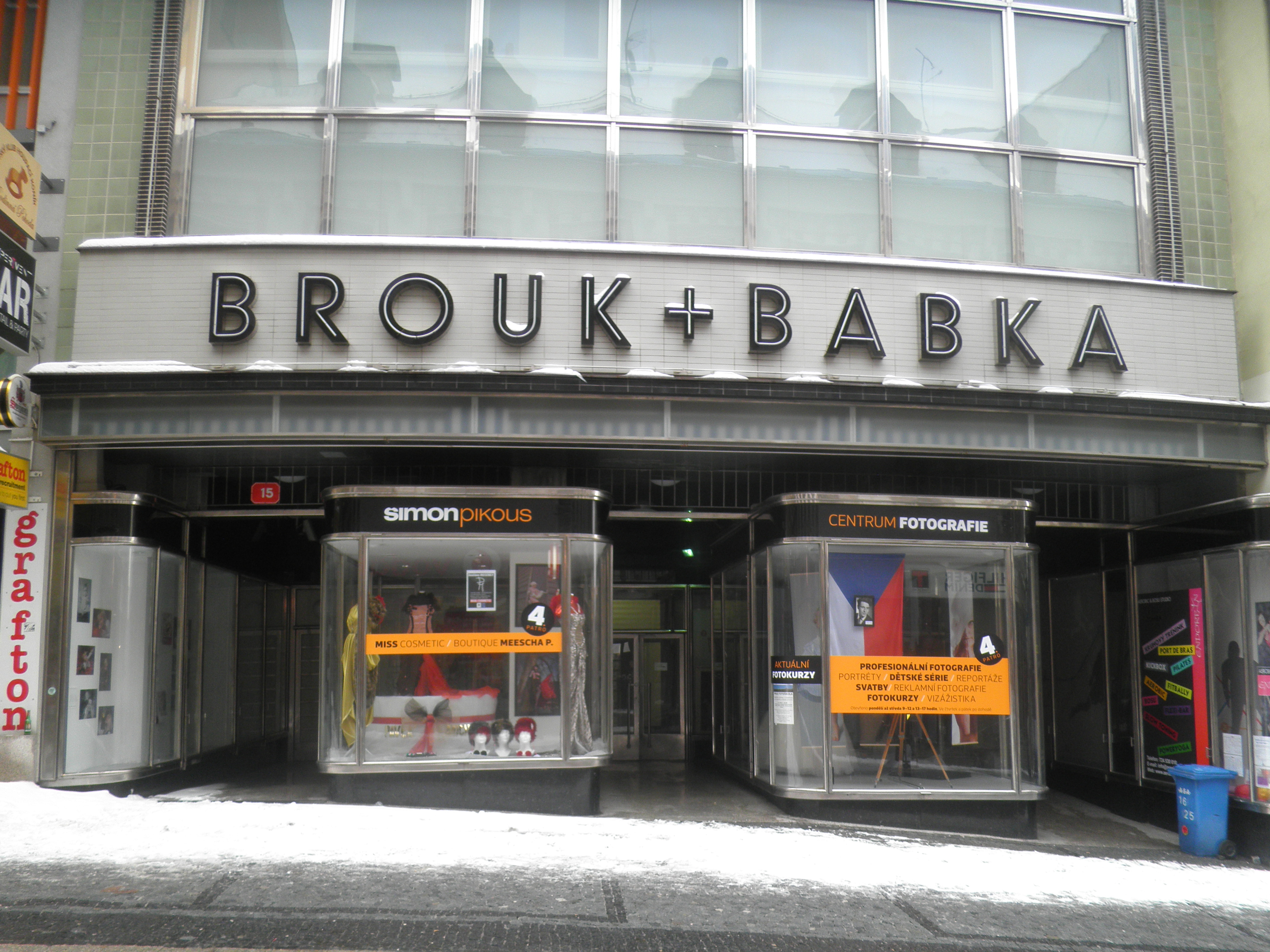 Obchodní dům Brouk a Babka (Liberec), ul. Pražská 15/23, Liberec